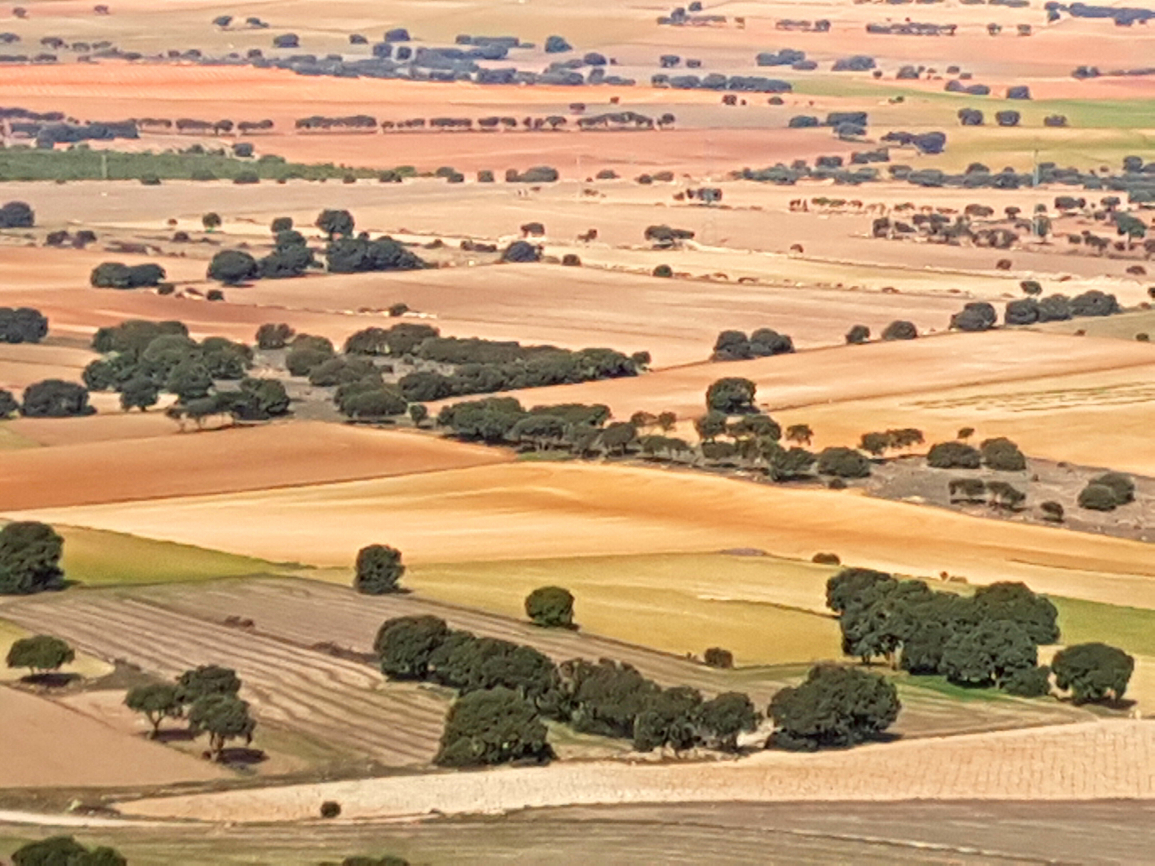 Fotografía realizada desde el Molatón 12-3-2017